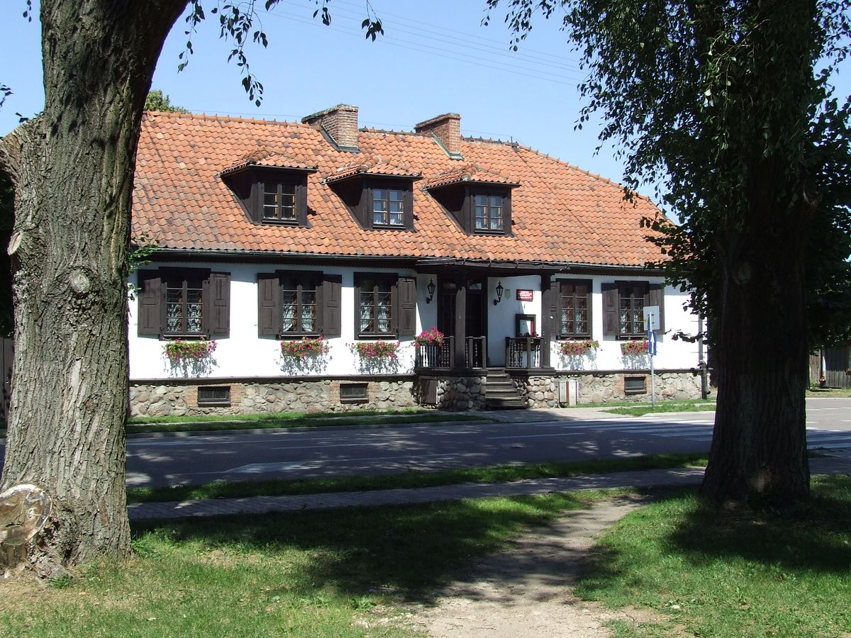 Muzeum Małego Miasta w Bieżuniu (Oddział Muzeum Wsi Mazowieckiej w Sierpcu) na rynku